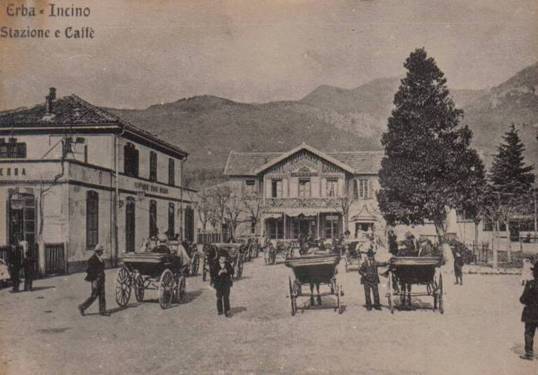 La vecchia stazione ferroviaria di Erba.